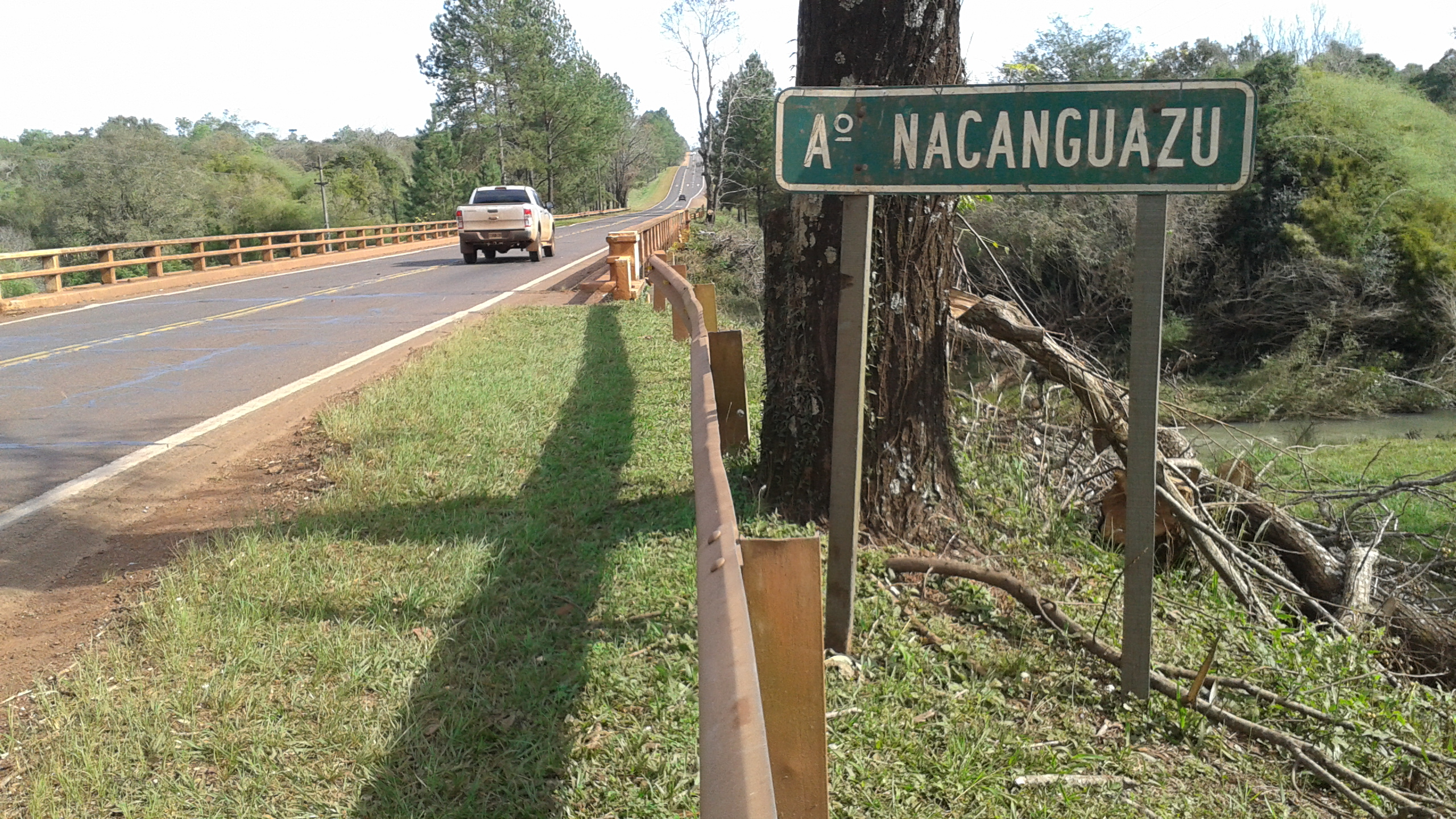 Cartel Arroyo Ñacanguazú (Provincia de Misiones, Argentina) cerca de Santo Pipó, por Ruta Nacional 12.